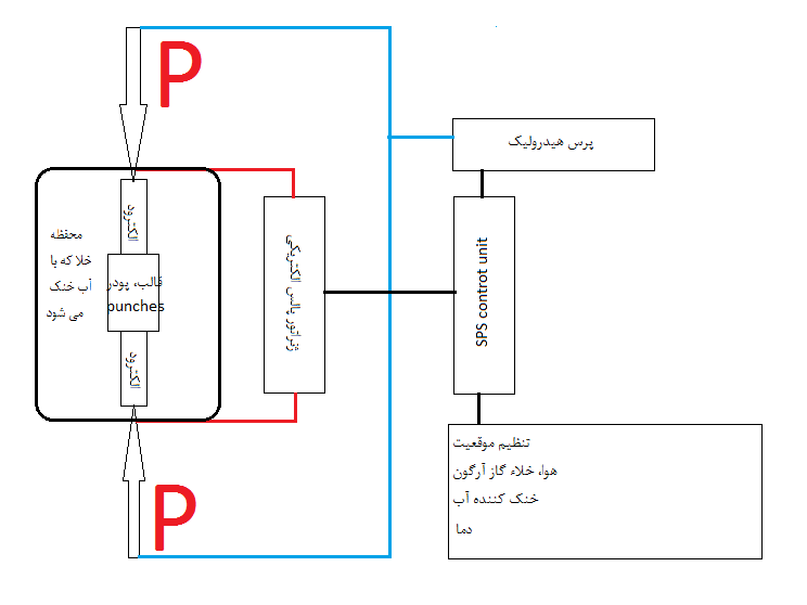 pcs approach to make glassy material